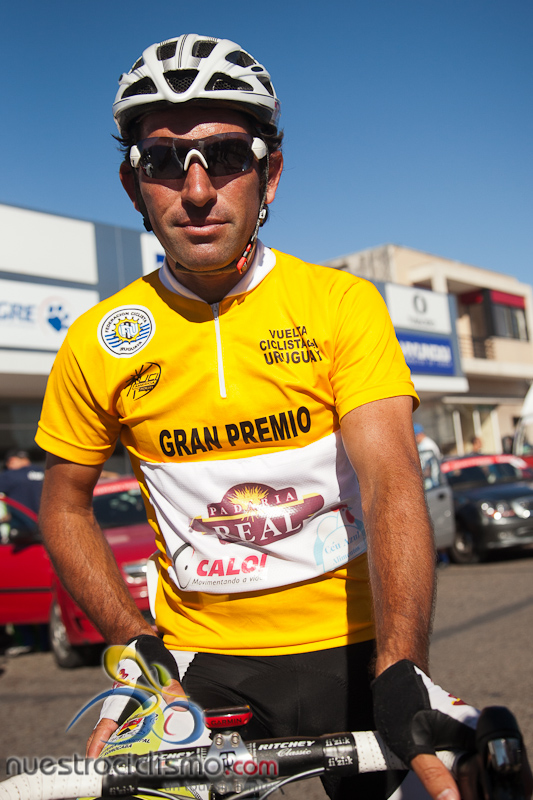 Ciclista argentino Edgardo Simon, del equipo brasileño Real Cycling Team, en la Vuelta ciclista del Uruguay 2012